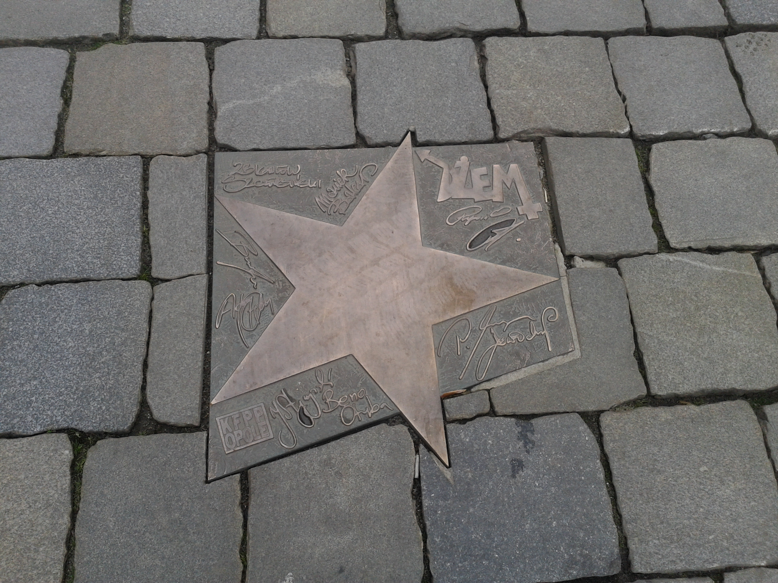 Gwiazda Dżemu w Alei Gwiazd Polskiej Piosenki w Opolu.